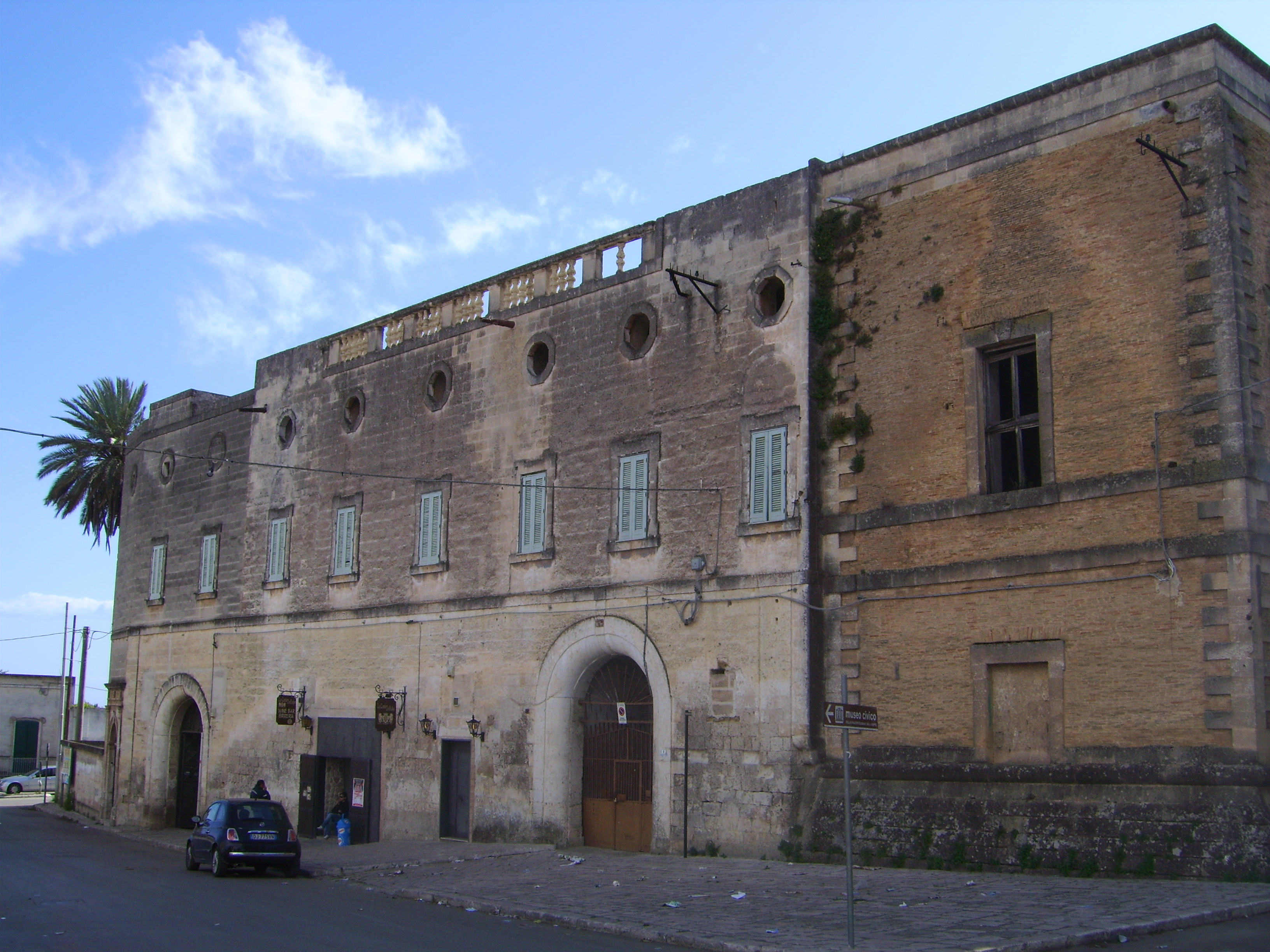 Castello Marchesale, Lizzano (TA)